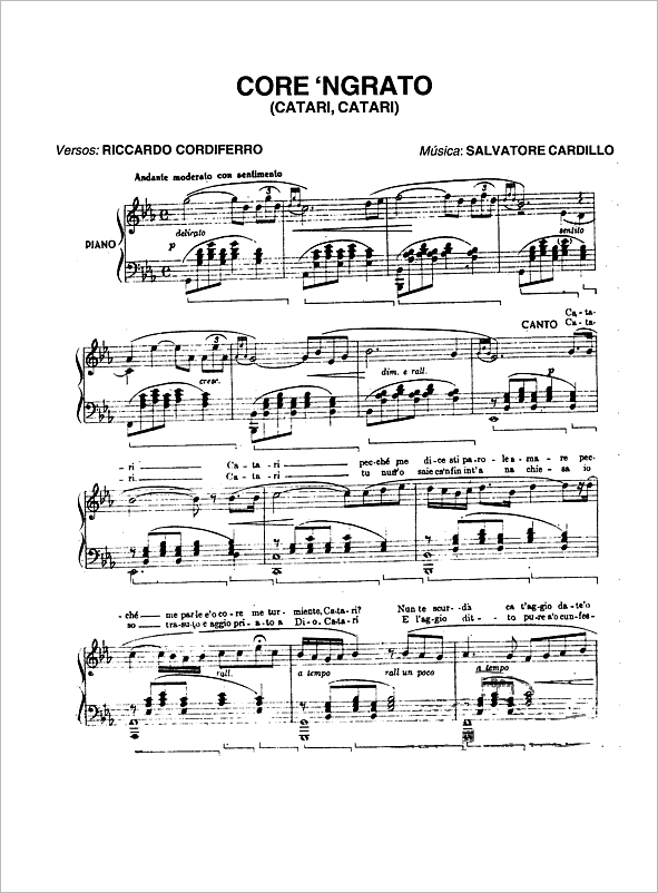 Partitura para piano de core 'ngrato